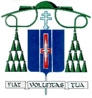 Escudo Arquiepiscopal de Dom José Antonio Aparecido Tosi Marques, Arcebispo de Fortaleza, CE.